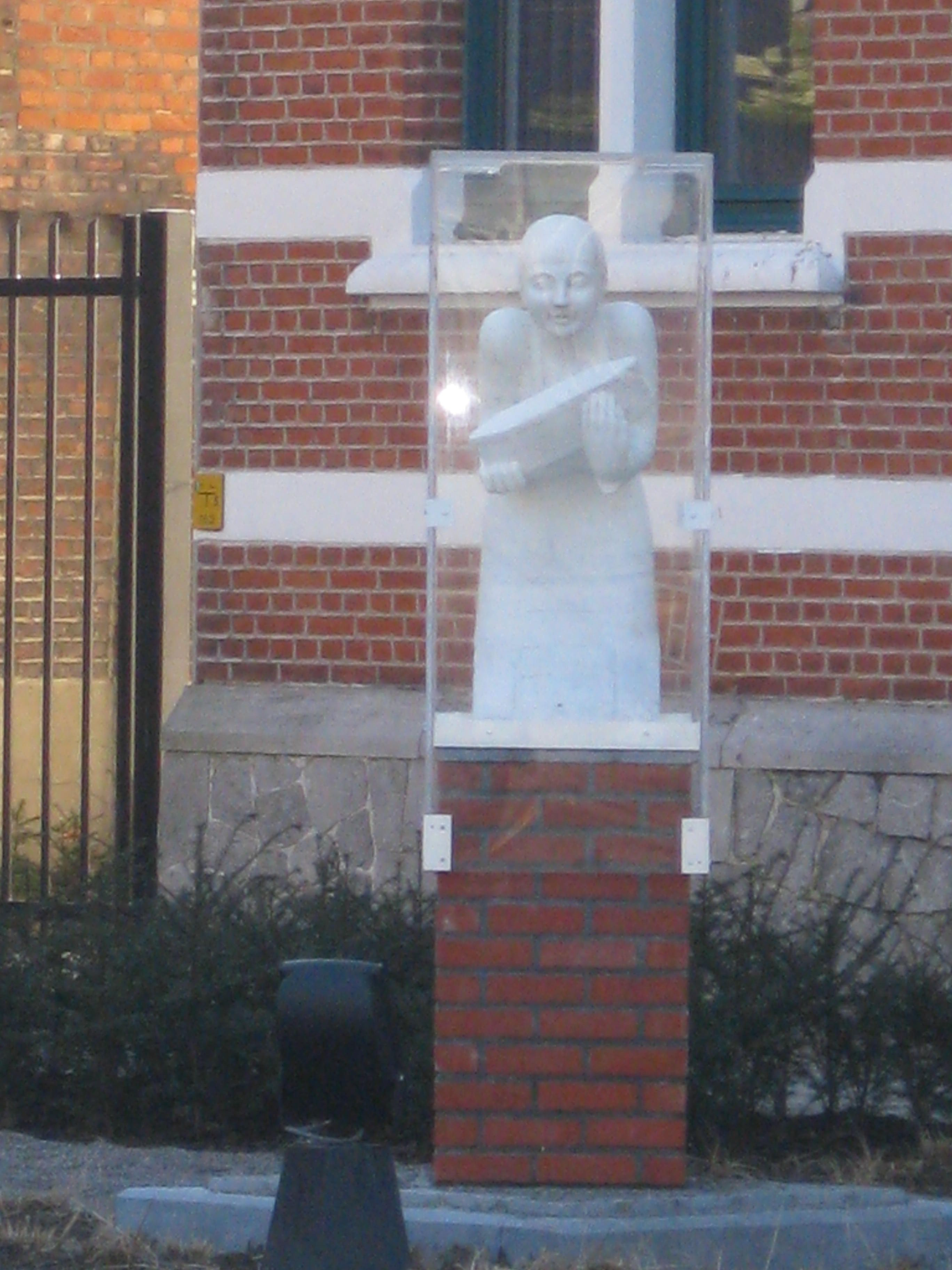 Beeld voor het gemeentehuis te Niel, ter herrinering aan de vele kinderarbeid in de steenbakkerijen in de Rupelstreek.